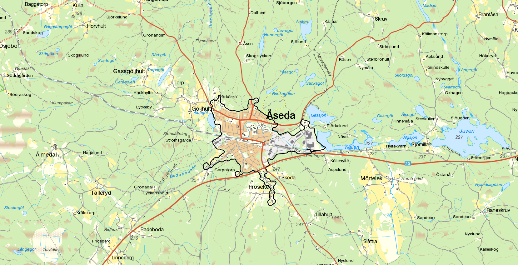 Tätorten Åseda med gränserna från Statistiska centralbyråns tätortsavgränsning 2015 i svart. Bakgrundskarta från Lantmäteriet, skala 1:30 236.